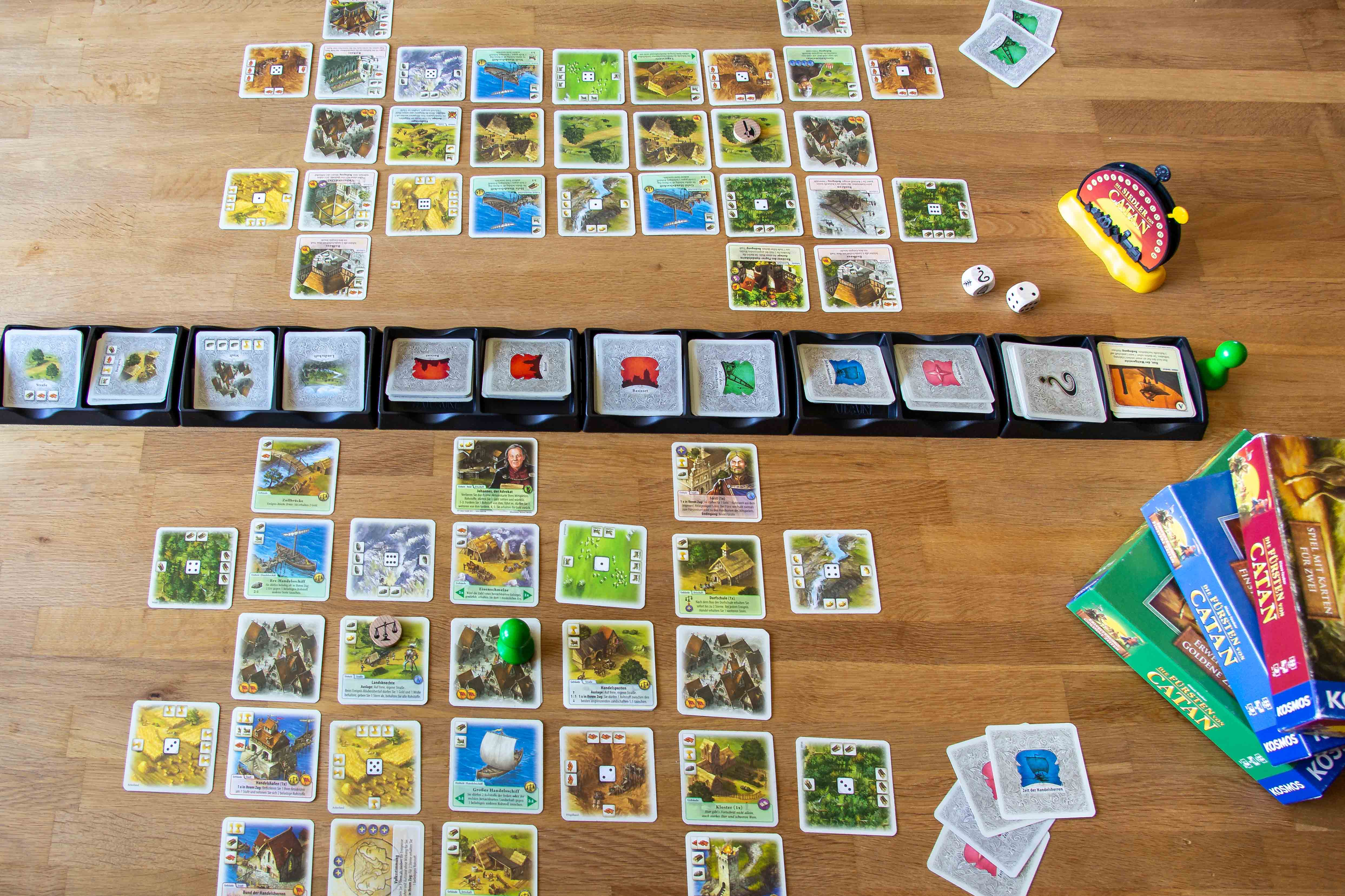 Endstand des Duells der Fürsten, gespielt mit den Erweiterungen Zeit des Fortschritts, Zeit der Handesherren und Zeit des Wohlstands